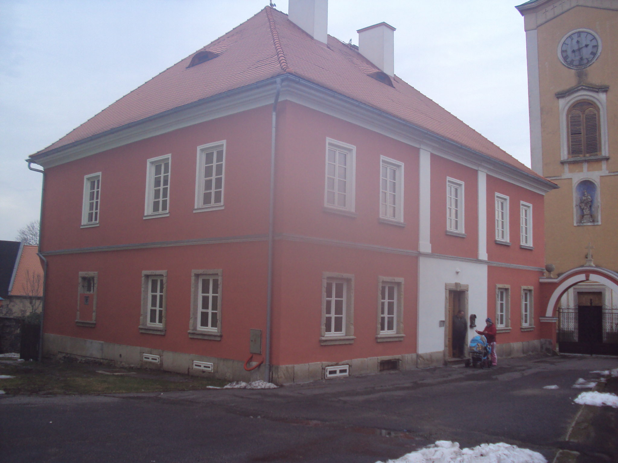 Fara u kostela v Kravařích u České Lípy, náměstí č.p.2, zamlžený objektiv